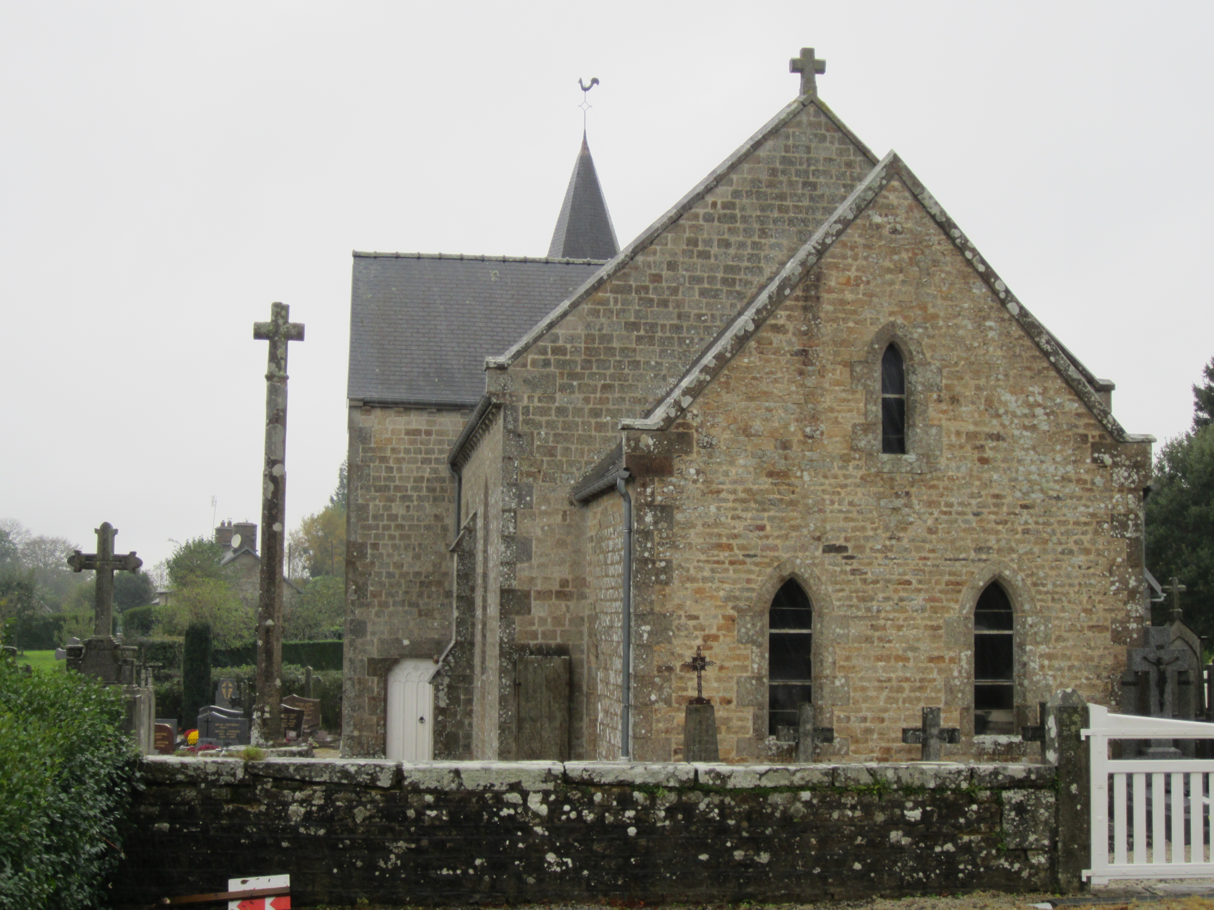 Lingeard, Manche